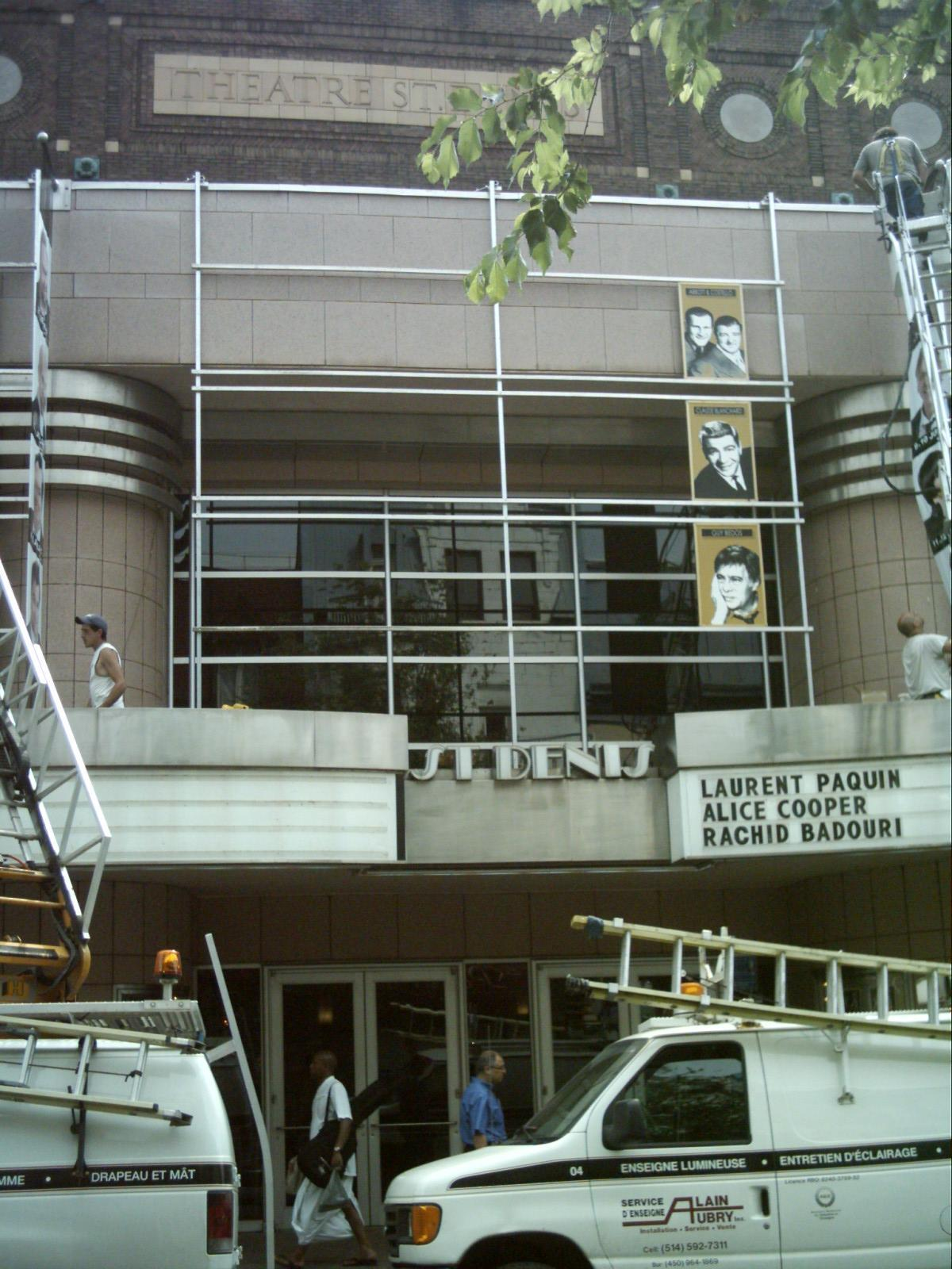 Le théâtre St-Denis est situé rue Saint-Denis à Montréal.